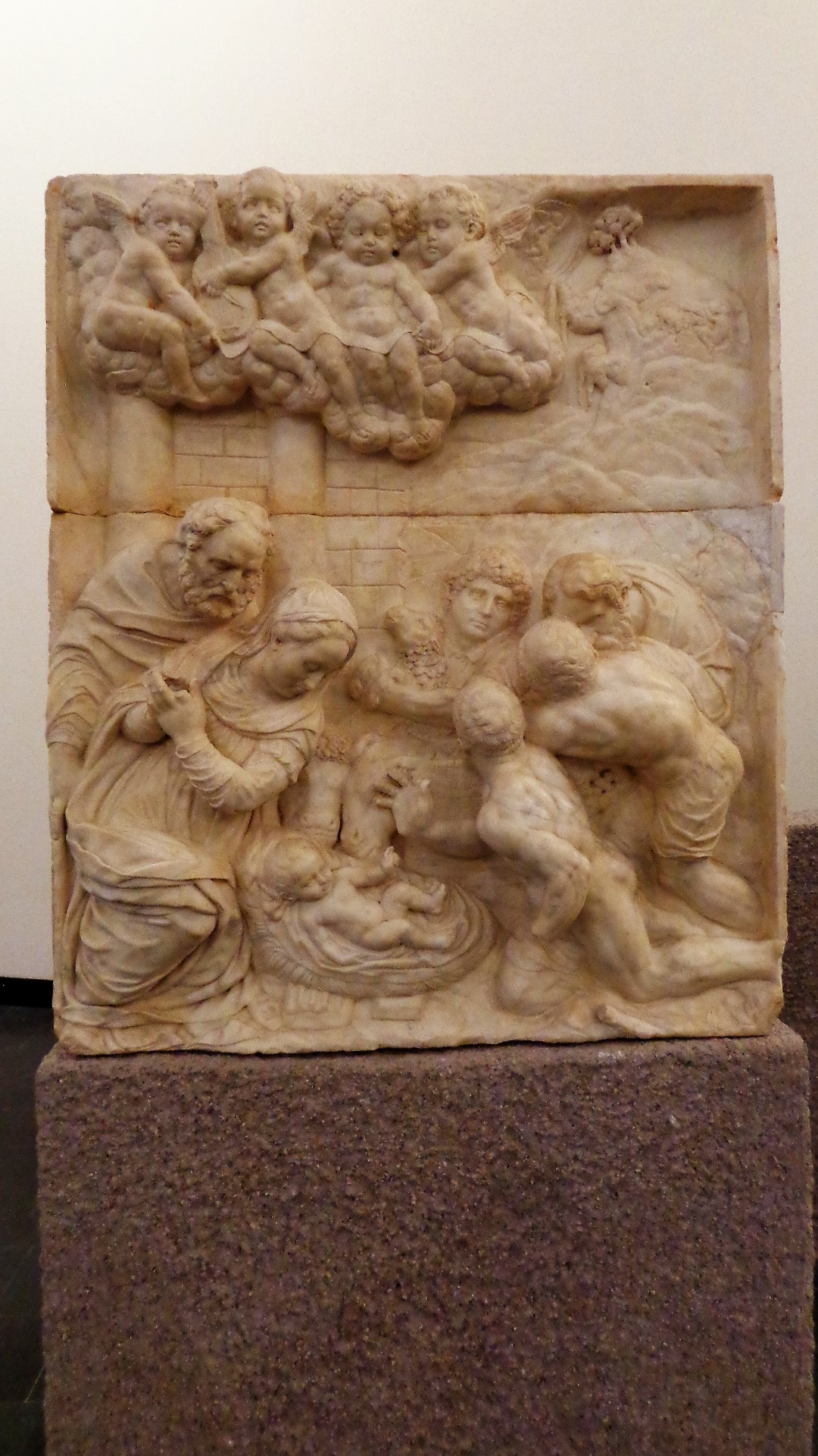 Natività altorilievo